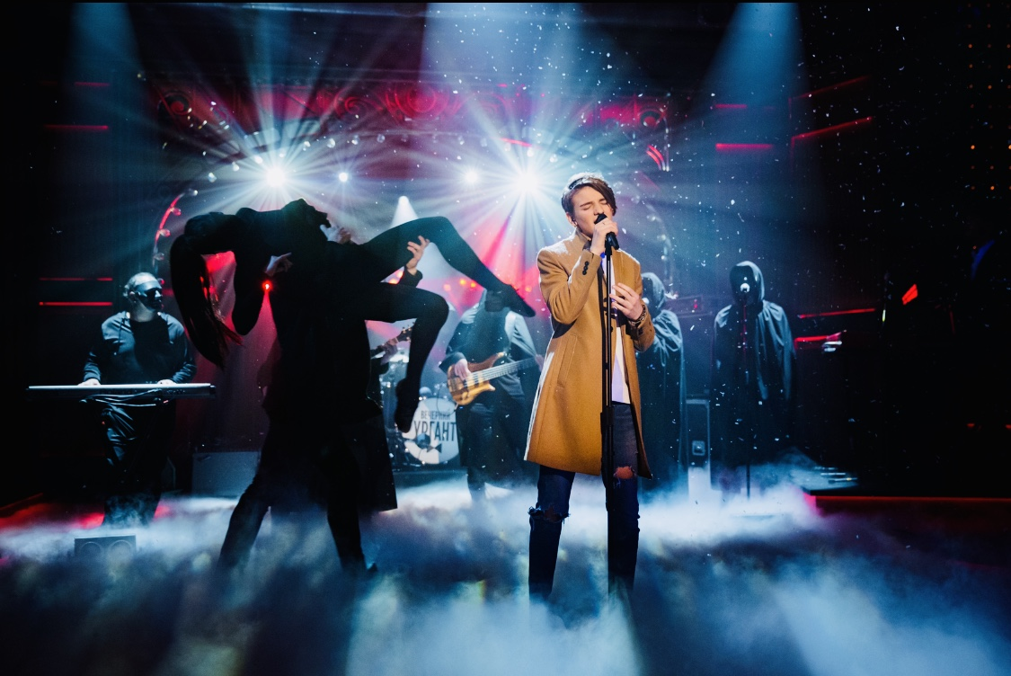 Kain Rivers